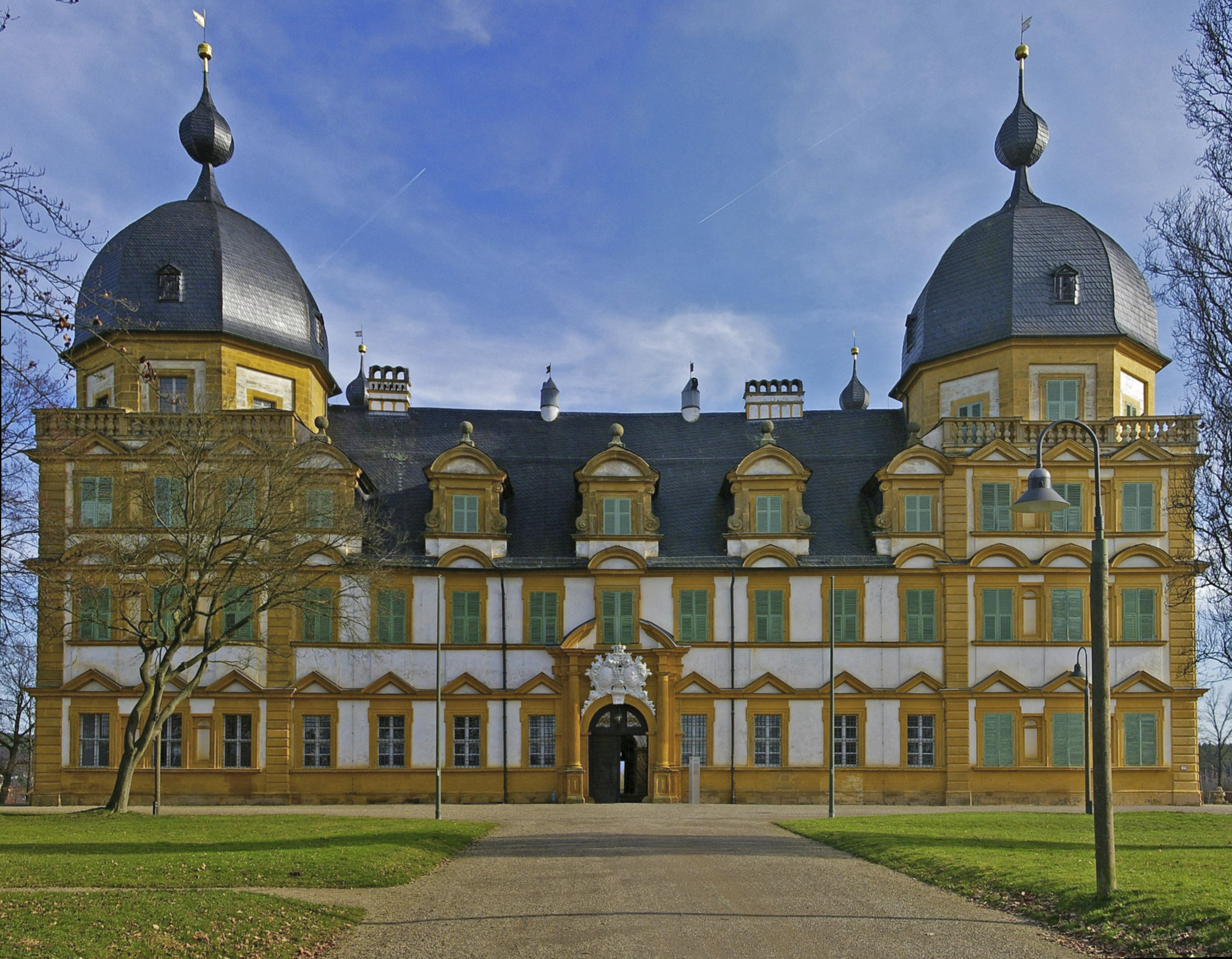 Schloss Seehof - Hauptseite